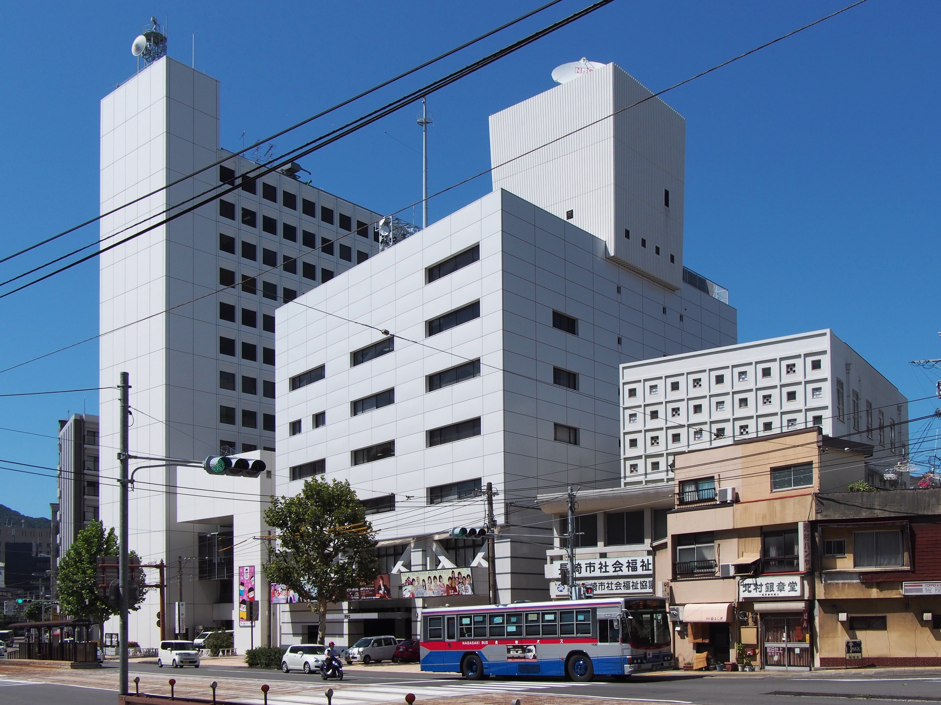 長崎放送本社とNBCソシア（長崎県長崎市）